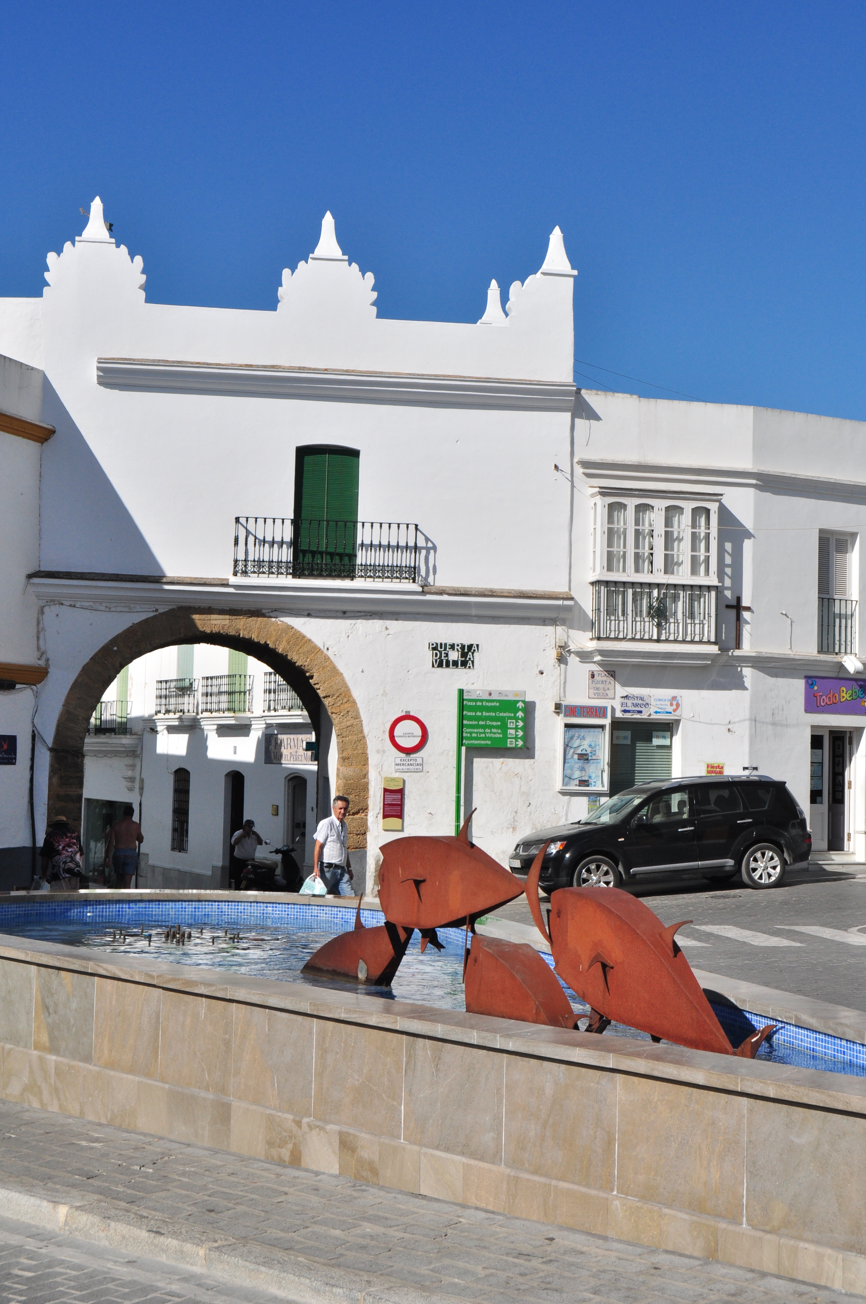 Conil de la Frontera - 001